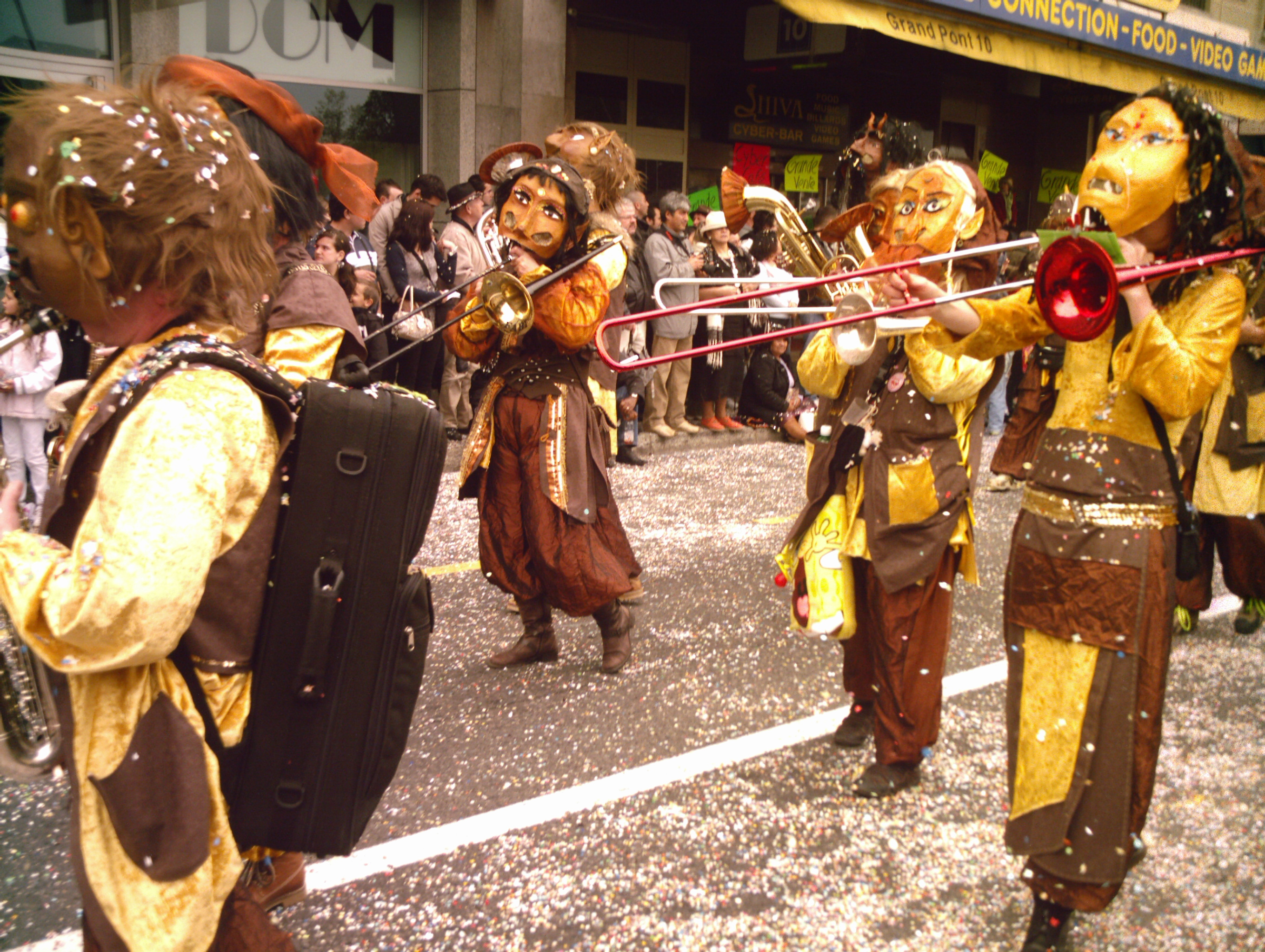 Une fanfare lors du carnaval de Lausanne 2010